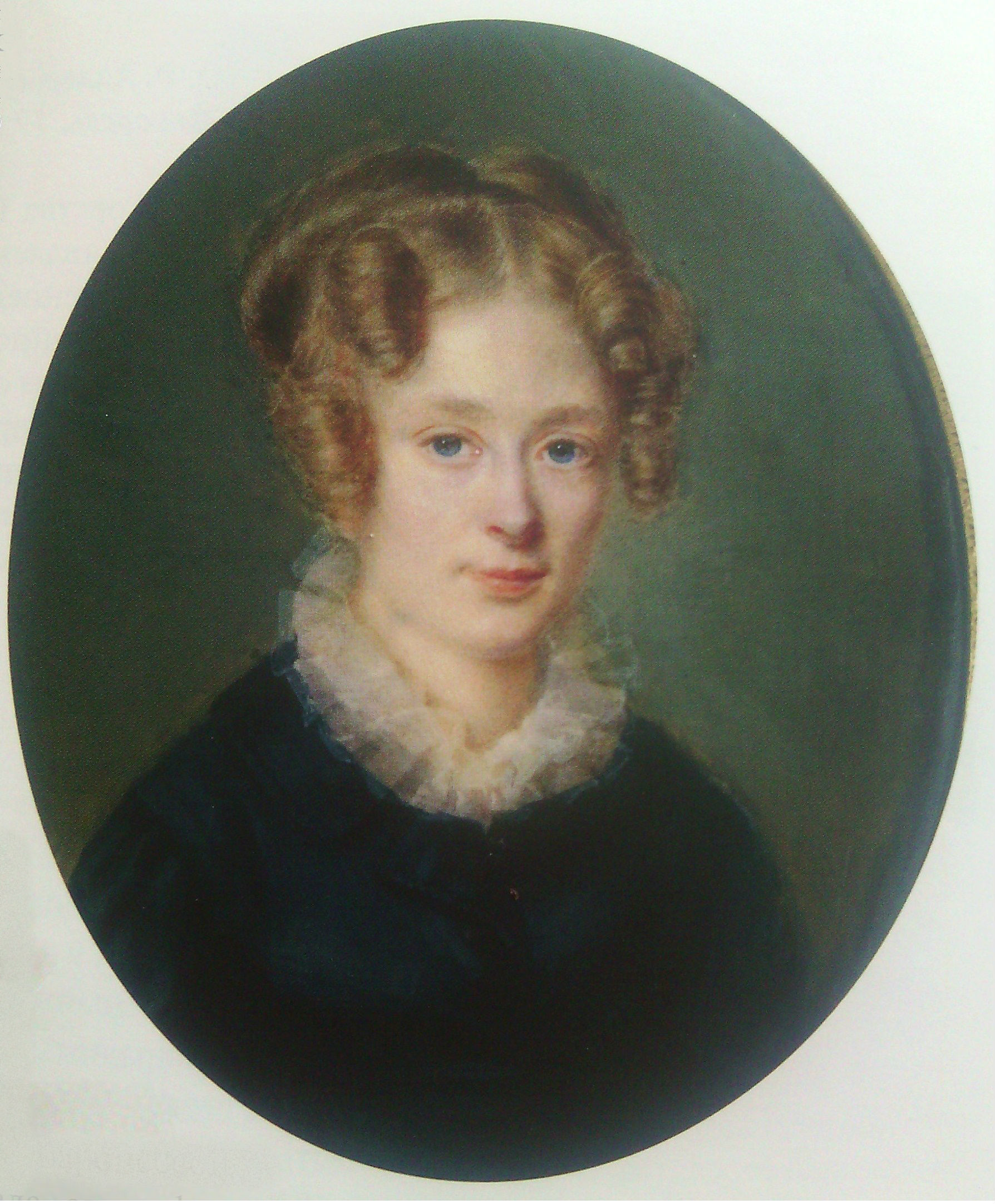 Фредерика Фёдоровна Шуберт (1791—1842), жена дипломата и ученого Г. И. Лангсдорфа.